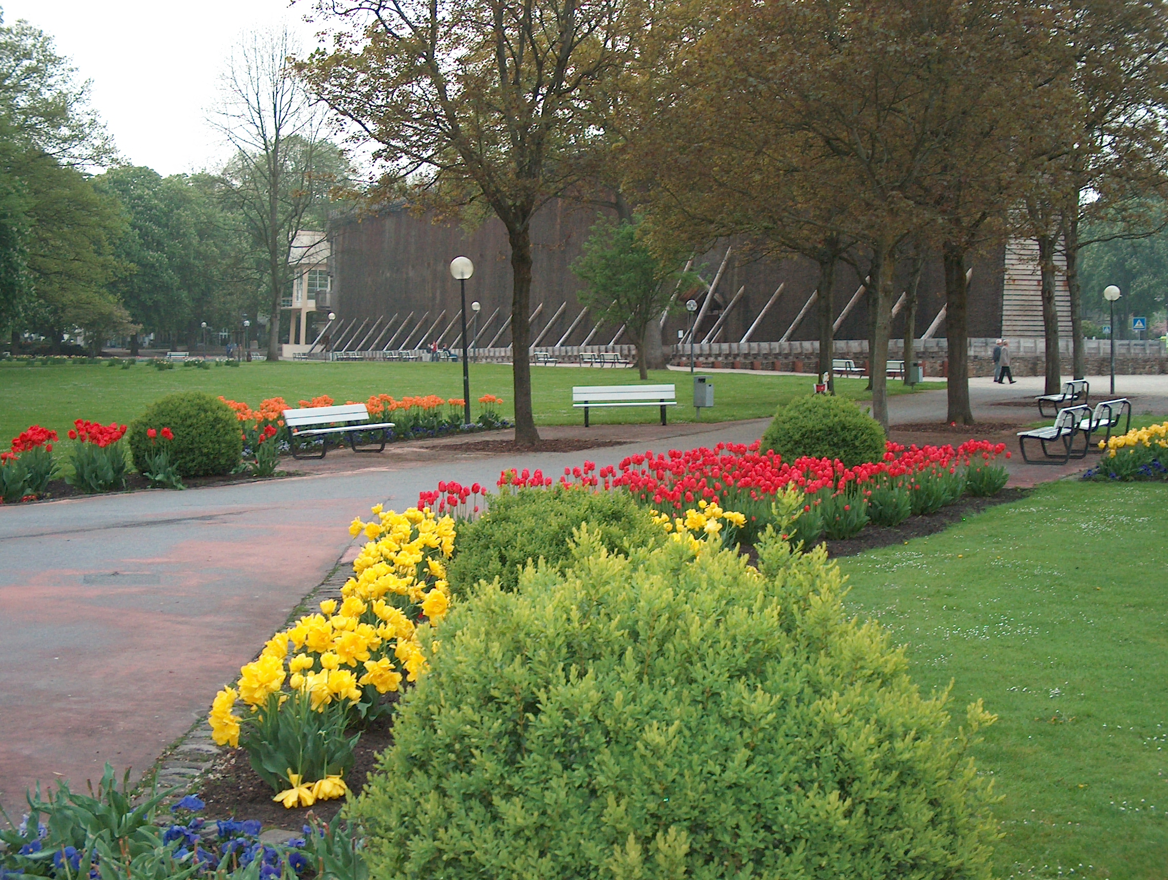 Kurpark in Bad Rothenfelde